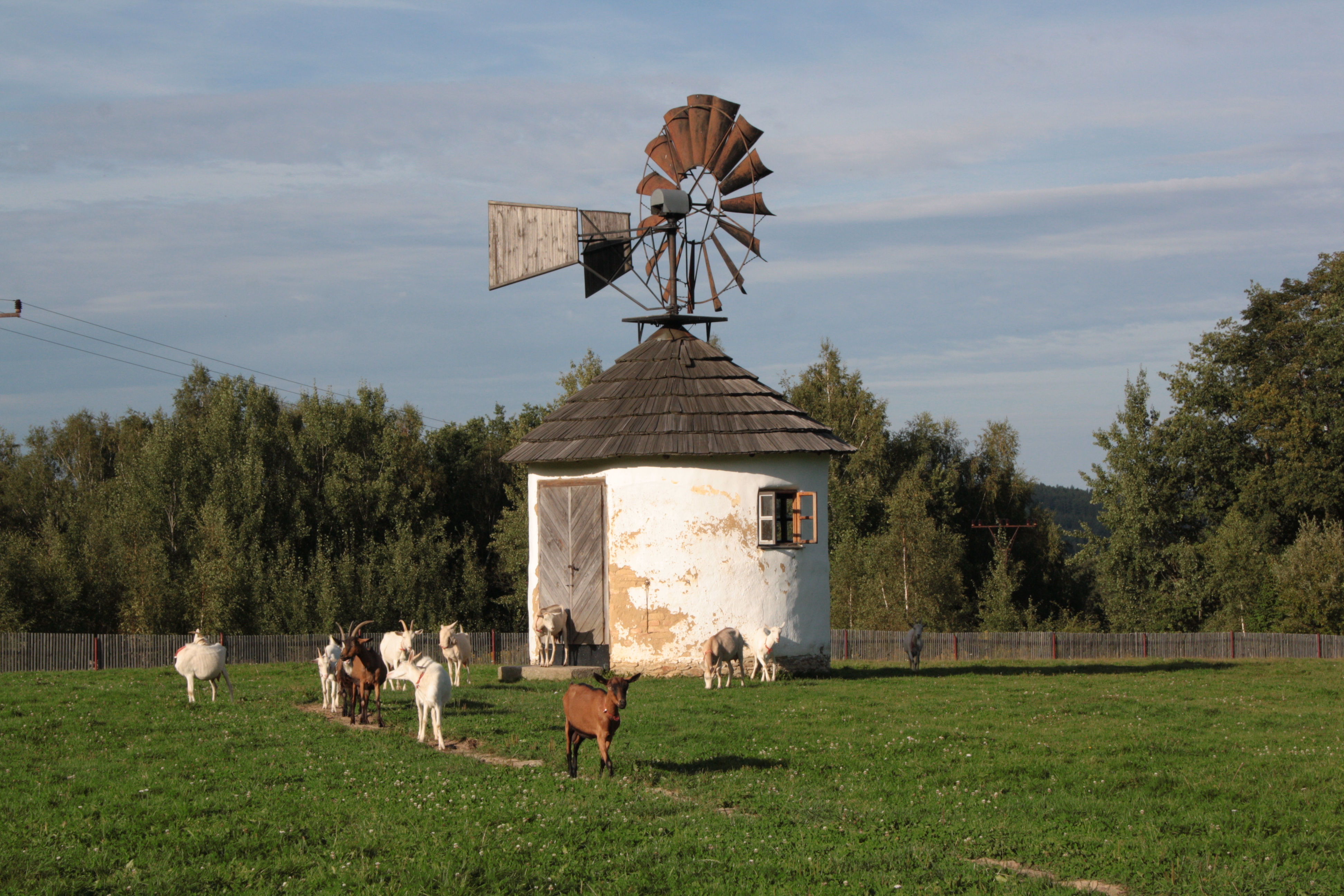 Větrný mlýn v Jndřichovicích pod Smrkem (pohled od jihozápadu).